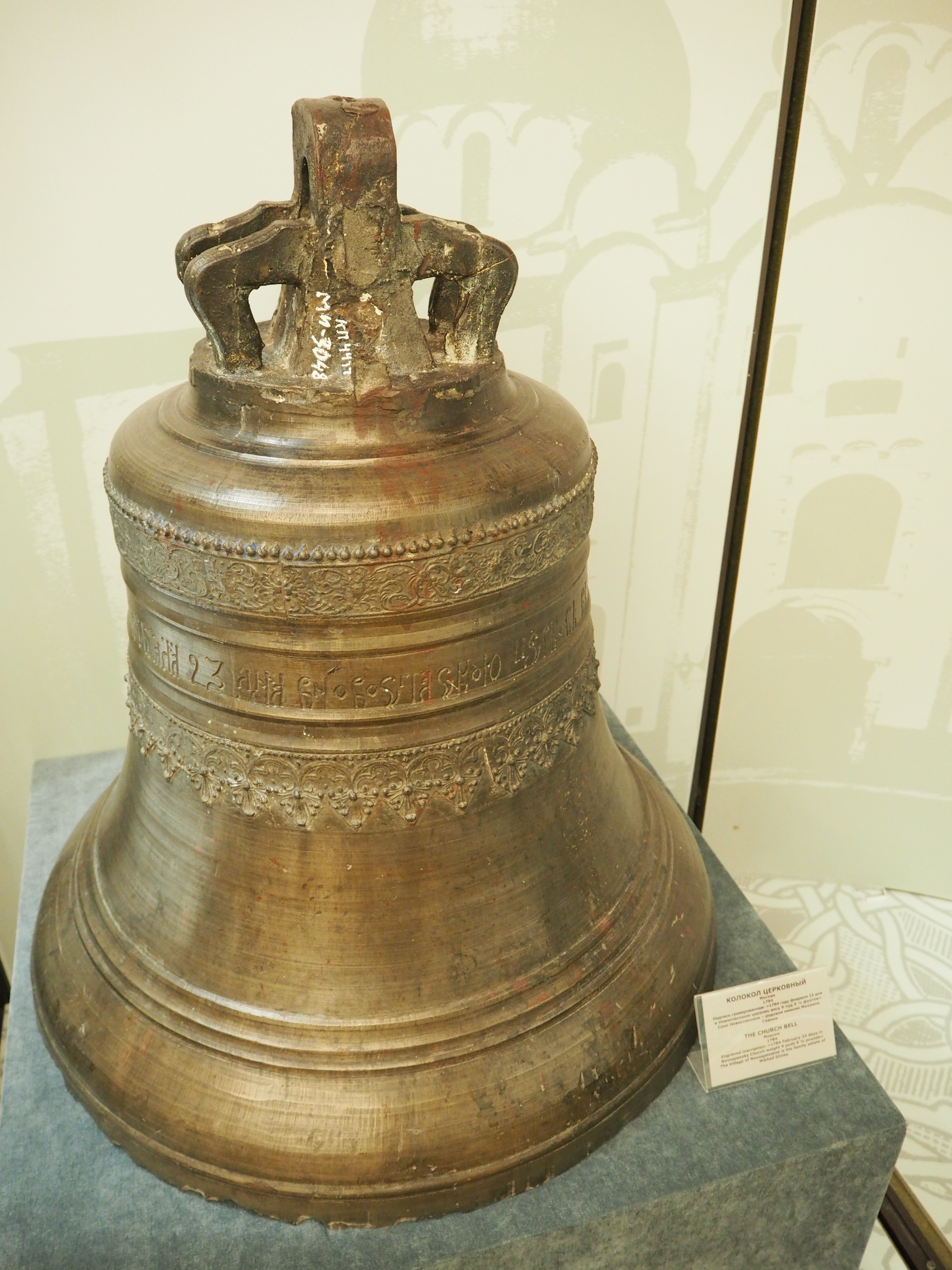 Колокол церковный. 1784. Село Новоспасское — родовое имение русского композитора Михаила Ивановича Глинки.